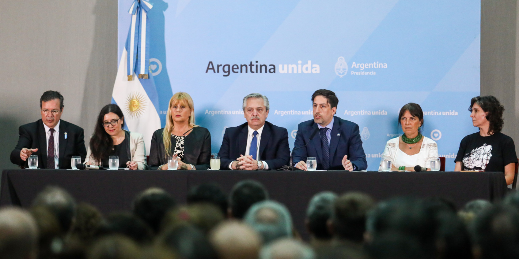 El presidente Alberto Fernández encabezó esta mañana en el Museo del Bicentenario el acto de presentación del Plan Nacional de Lecturas, que apunta a alcanzar a 10 millones de niños, niñas y adolescentes de nivel primario y secundario de todo el país y a fortalecer el trabajo de docentes y bibliotecarios.